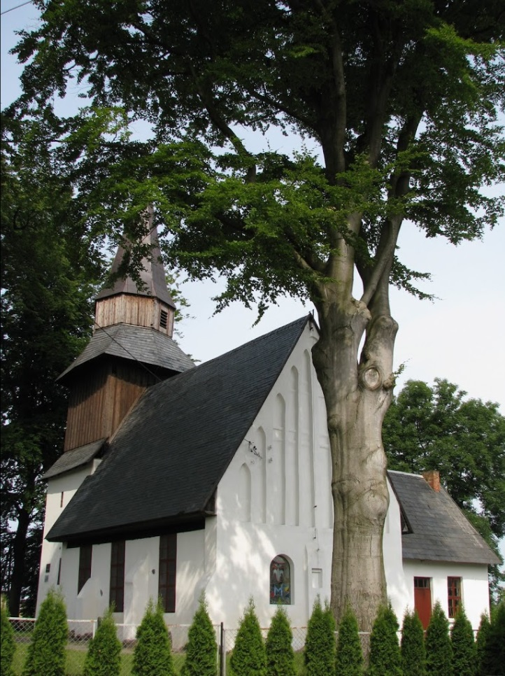 Karwice późnogotycki kościół ok.1500 r.